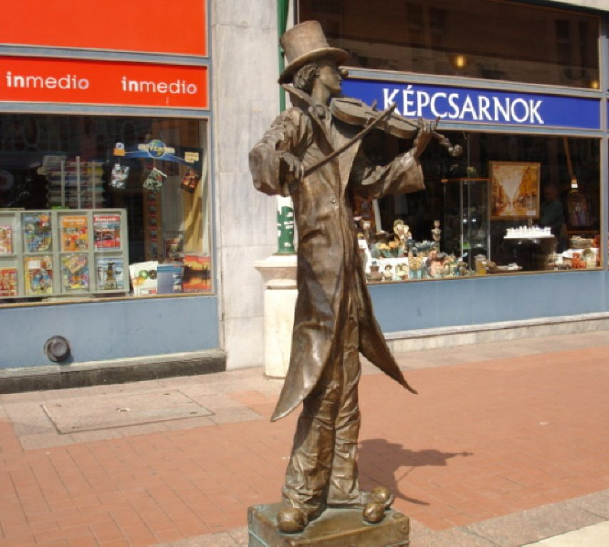 Több figurás kompozició. Szeged, Kárász utca népszerű figurája az utcai zenész és a vele szemben oszlopra támaszkodva hallgató nőalak, a bámészkodó kisgyerek és bozontos kutyája.